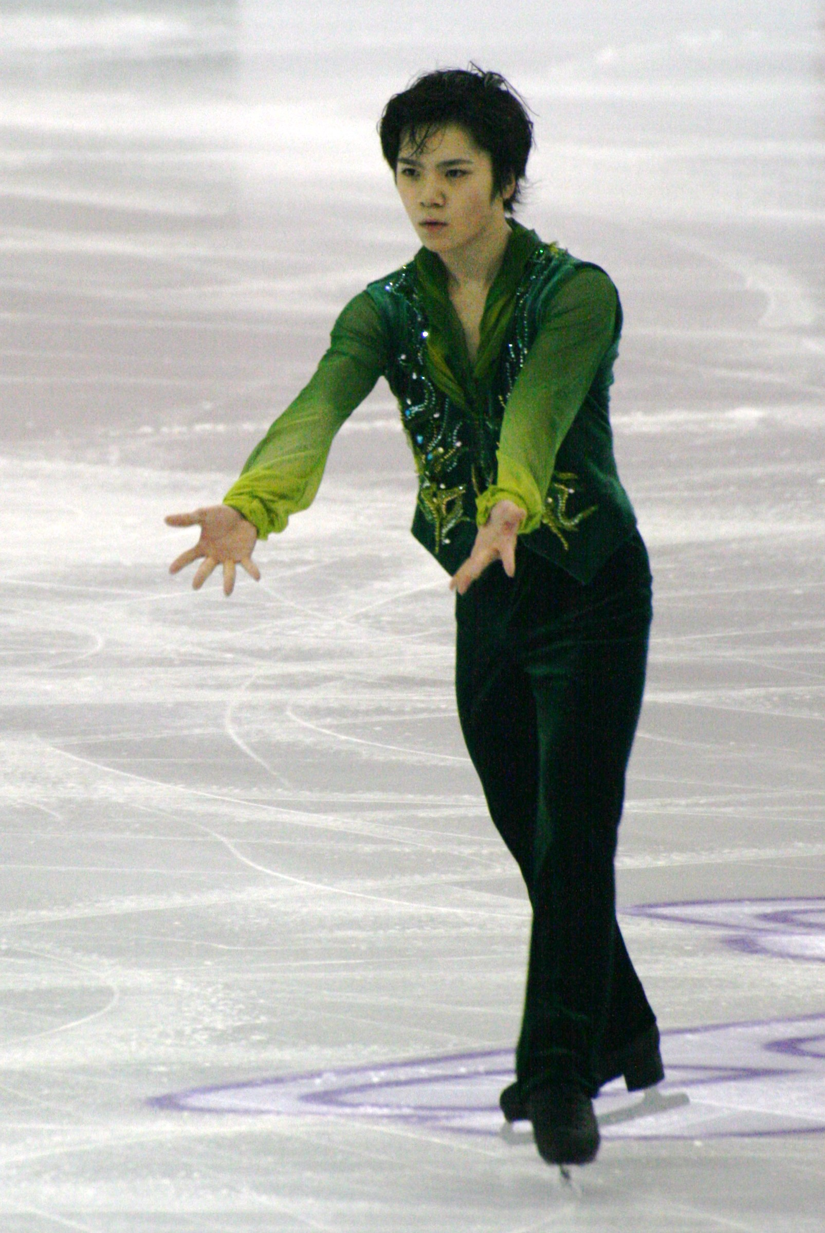 Шома Уно (Япония) на финале Гран-при по фигурному катанию 2015-2016.